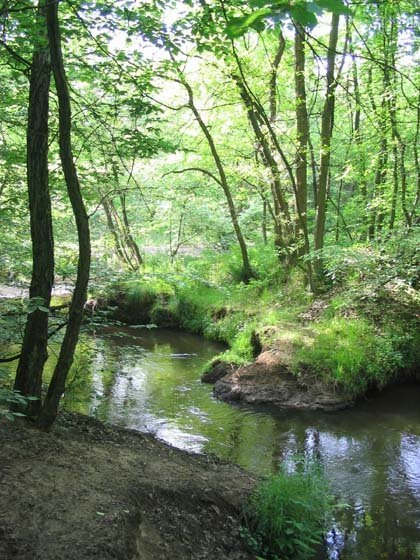 Foto door gebruiker zelf gemaakt.